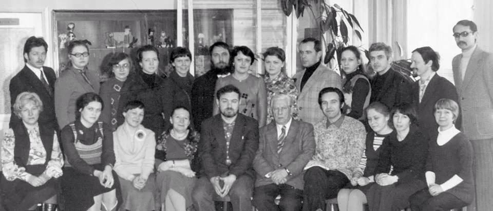 Участники Всероссийской конференции молодых фольклористов «Традиционный фольклор и современность» (20–26 февраля 1978), организованной Фольклорной комиссией Союза композиторов РСФСР. Ленинградская область, г. Кириши. 25 февраля 1978 г. В первом ряду сидят: Е. В. Гиппиус шестой слева; слева направо – Краснопольская Т. (Петрозаводск), Геворкян Е. [Дорохова] (Москва), Бадмаева Т. (Элиста), Красовская Ю. (Москва), Мациевский И. В. (Ленинград), Кабанов А. С. (Москва), Резниченко Е. (Москва), Рогачевская Е. (Ленинград), Мальми В. (Петрозаводск). Во втором ряду стоят: Бойко Ю. (Ленинград), Симакова И. (Петрозаводск), Терёхина Н. (Москва), Якунина Г. (Курск), Руднева Е., Васильев В. (Беломорск), Садыкова В. [Юнусова] (Владивосток), Рудиченко Т. (Ростов-на-Дону), Дюдюк Е. (Львов), Енговатова М. (Москва), Лобанов М. (Ленинград), Бродский И. [Богданов] (Москва), Субаналиев С. (Фрунзе – Бишкек).